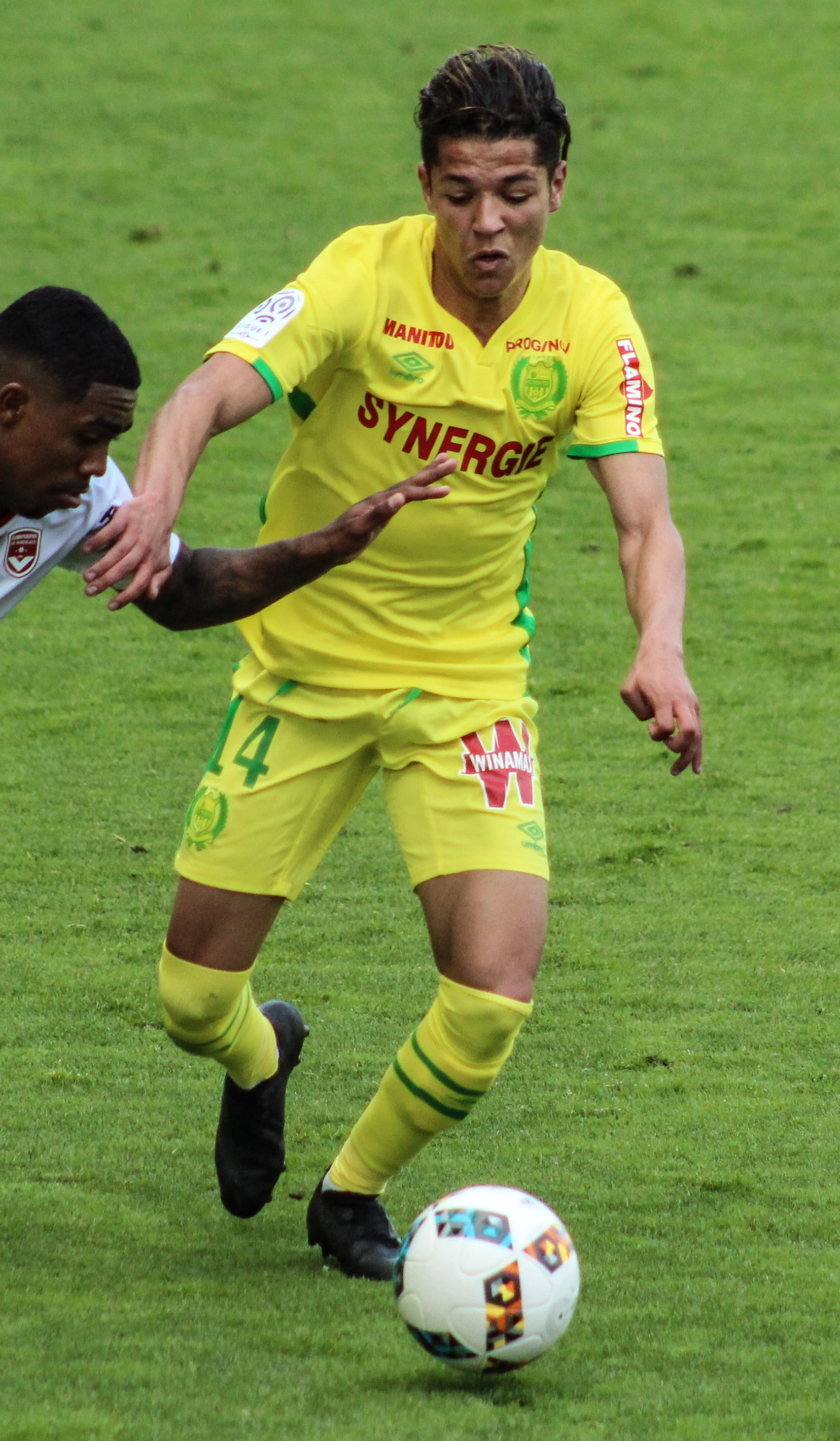 ENGLISH | PORTUGUÊS | FRANÇAIS | ESPAÑOL Follow my work in other social medias | Siga meu trabalho em outras redes | Suivre mon travail dans des autres reseaux | Sigue mi trabajo en otras redes sociales Facebook - F. Neitzke Photo - Instagram - @neitzkef - All my pictures can be republished or shared only after my given consent: Todas as fotos podem ser publicadas e/ou utilizadas mediante meu consentimento Tous les photos peuvent être utilisés ou publiés seulement après ma autorisation Todas mis fotos pueden volver a ser publicadas y compartirse únicamente bajo mi consentimiento dado